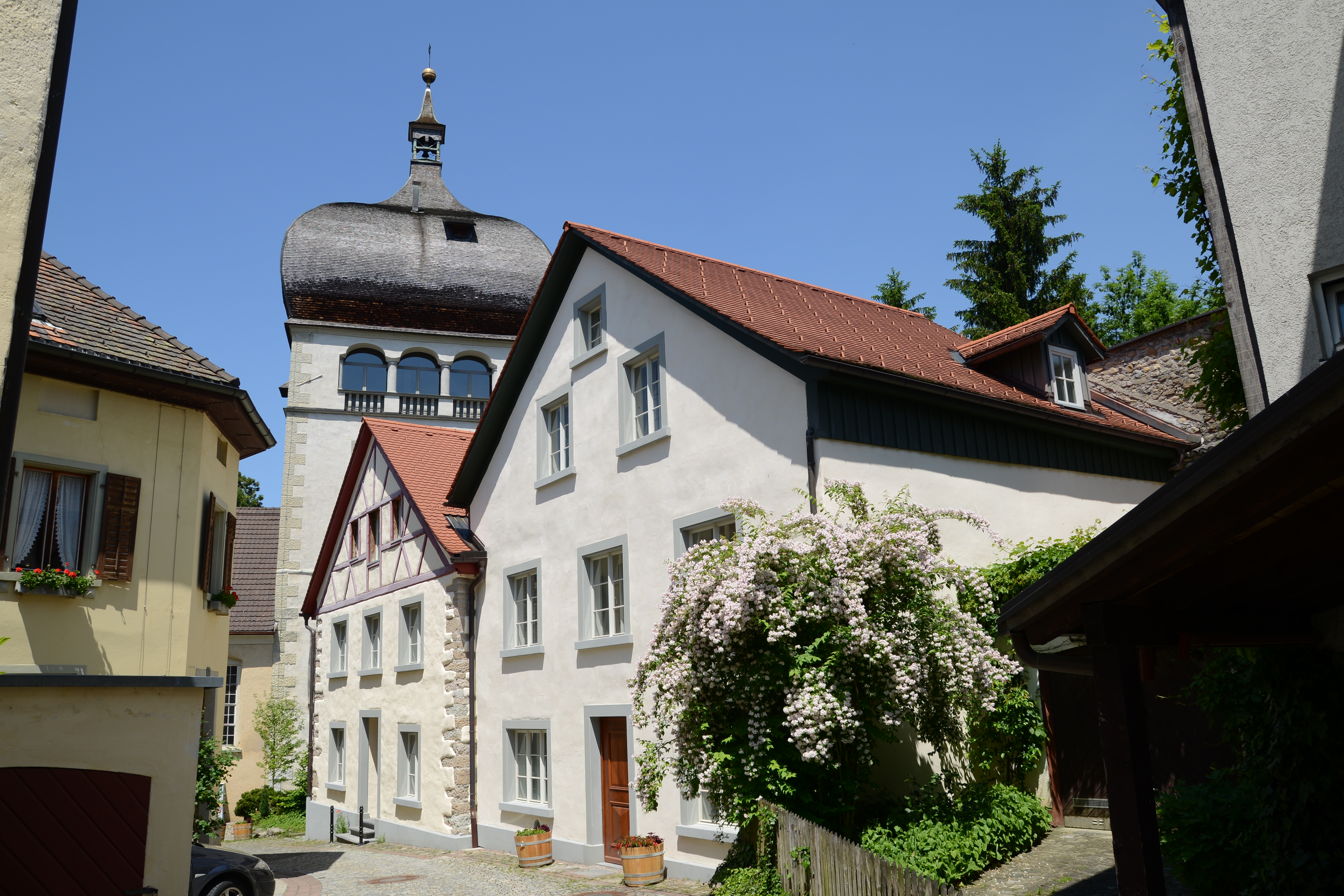 Wohnhäuser an der Martinsgasse Nr.9+5 in der Oberstadt von Bregenz. Nr.9 Nr.5